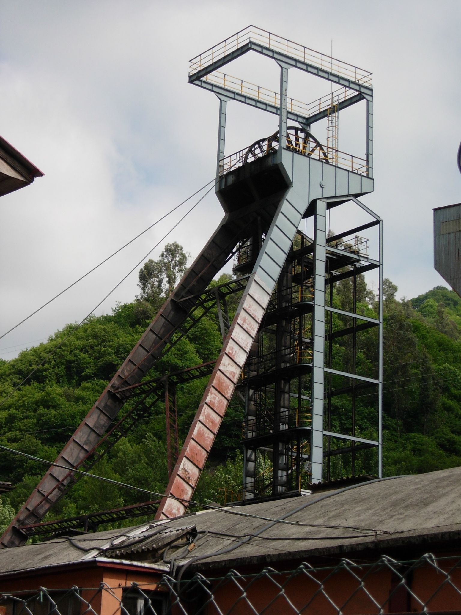 Castillete del pozo San Inocencio, en Cortina-Figaredo (Mieres), Asturias (España).